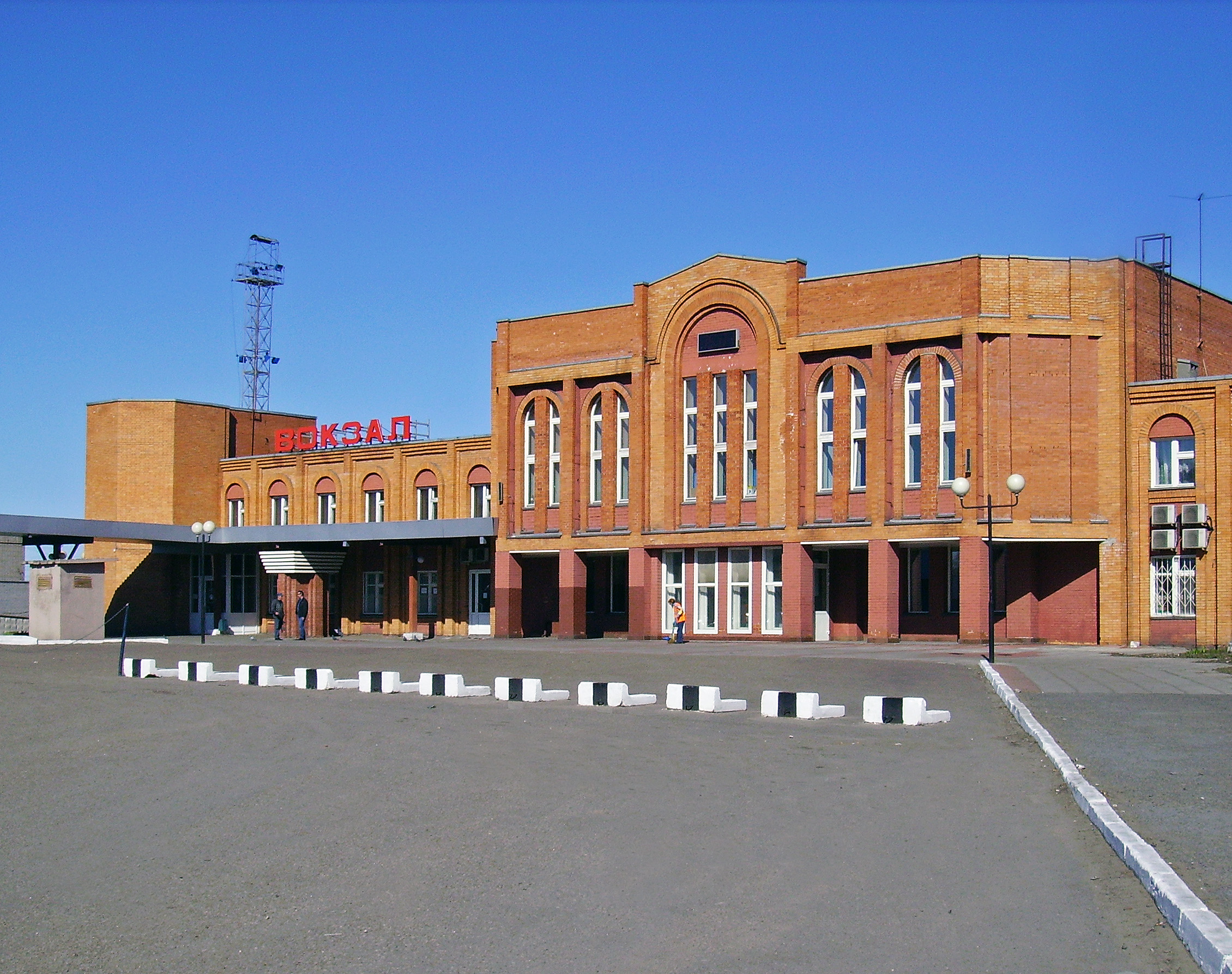 Котельнич. Железнодорожный вокзал